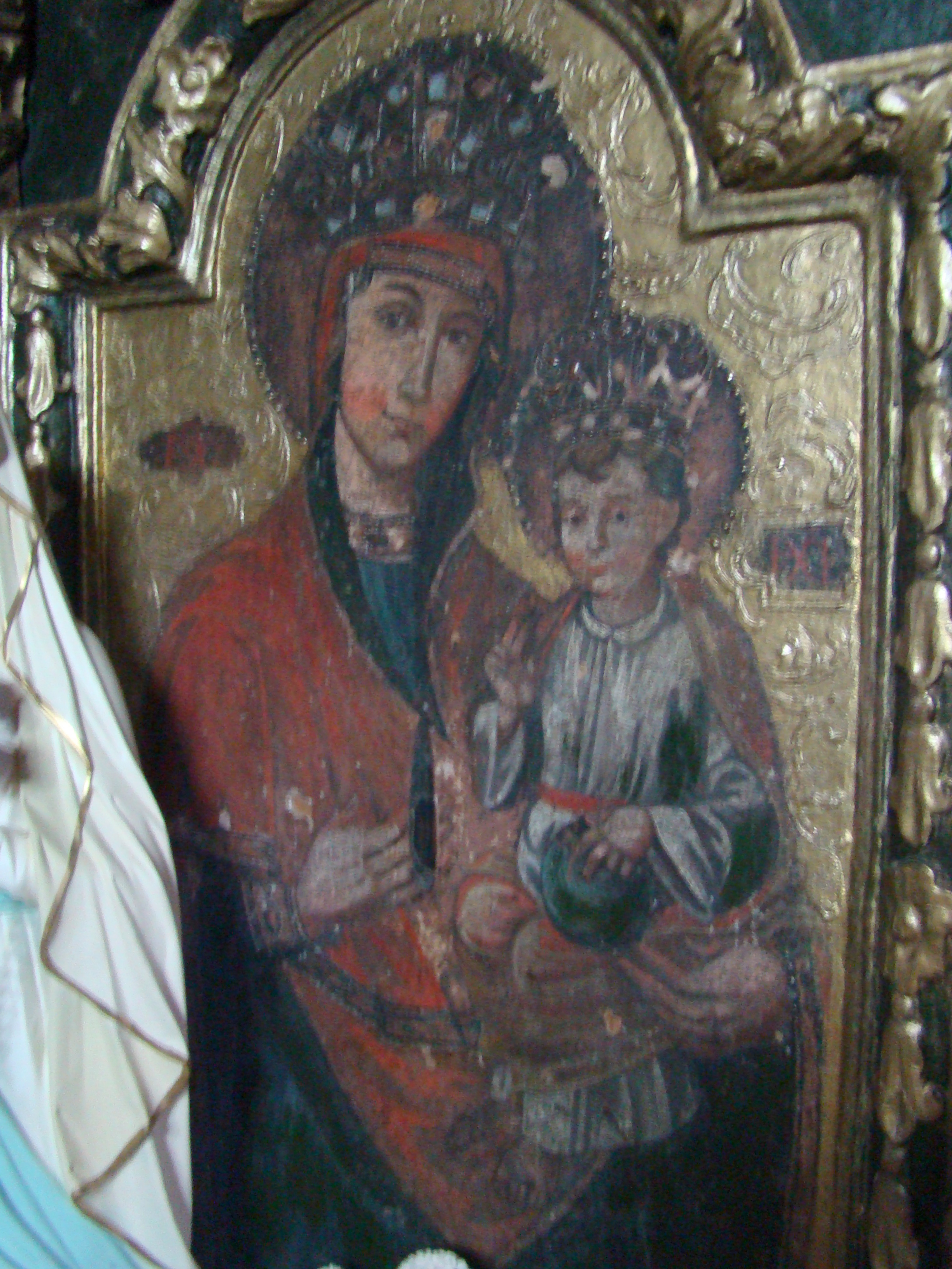 Biserica de lemn "Nașterea Maicii Domnului", sat Rona de Jos; comuna Rona de Jos, județul Maramureș